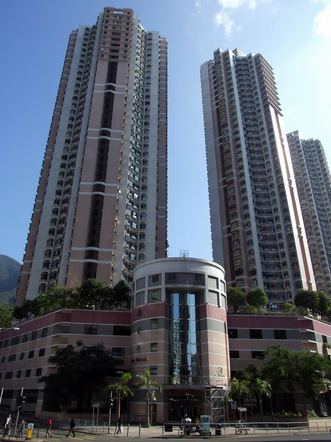 雅景台